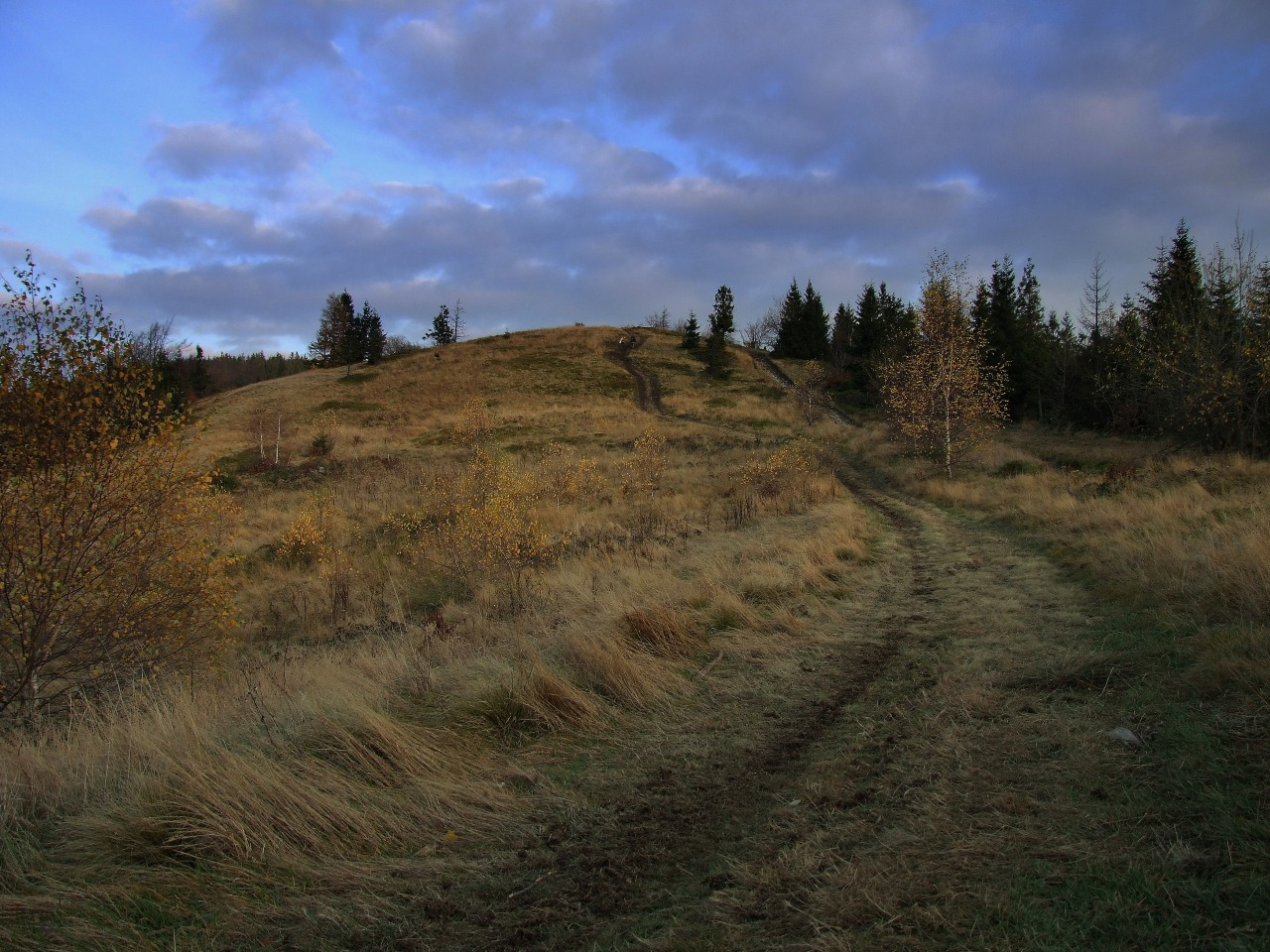 Polana pod Jasieniem